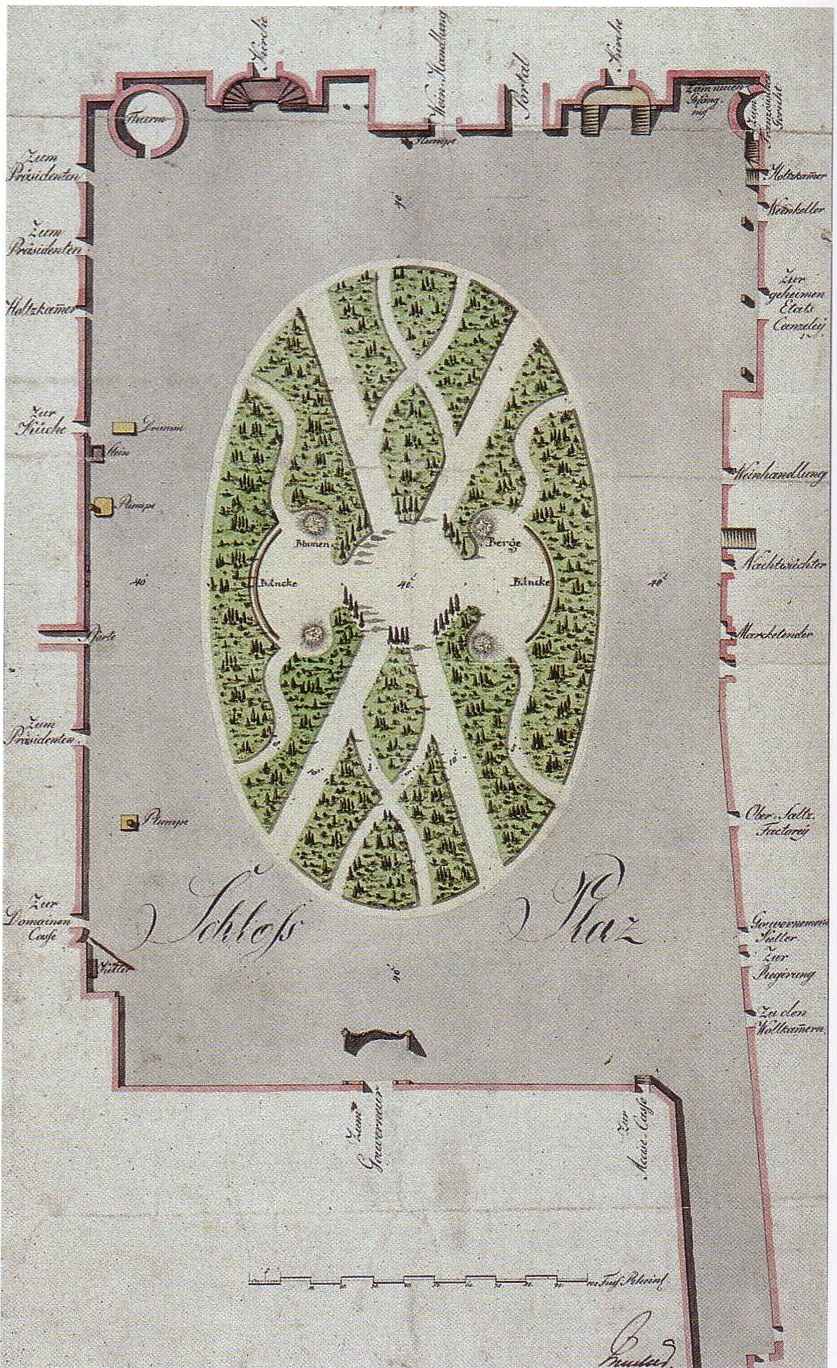 Nicht realisierter Entwurf einer Grünanlage für den Hof des Königsberger Schlosses